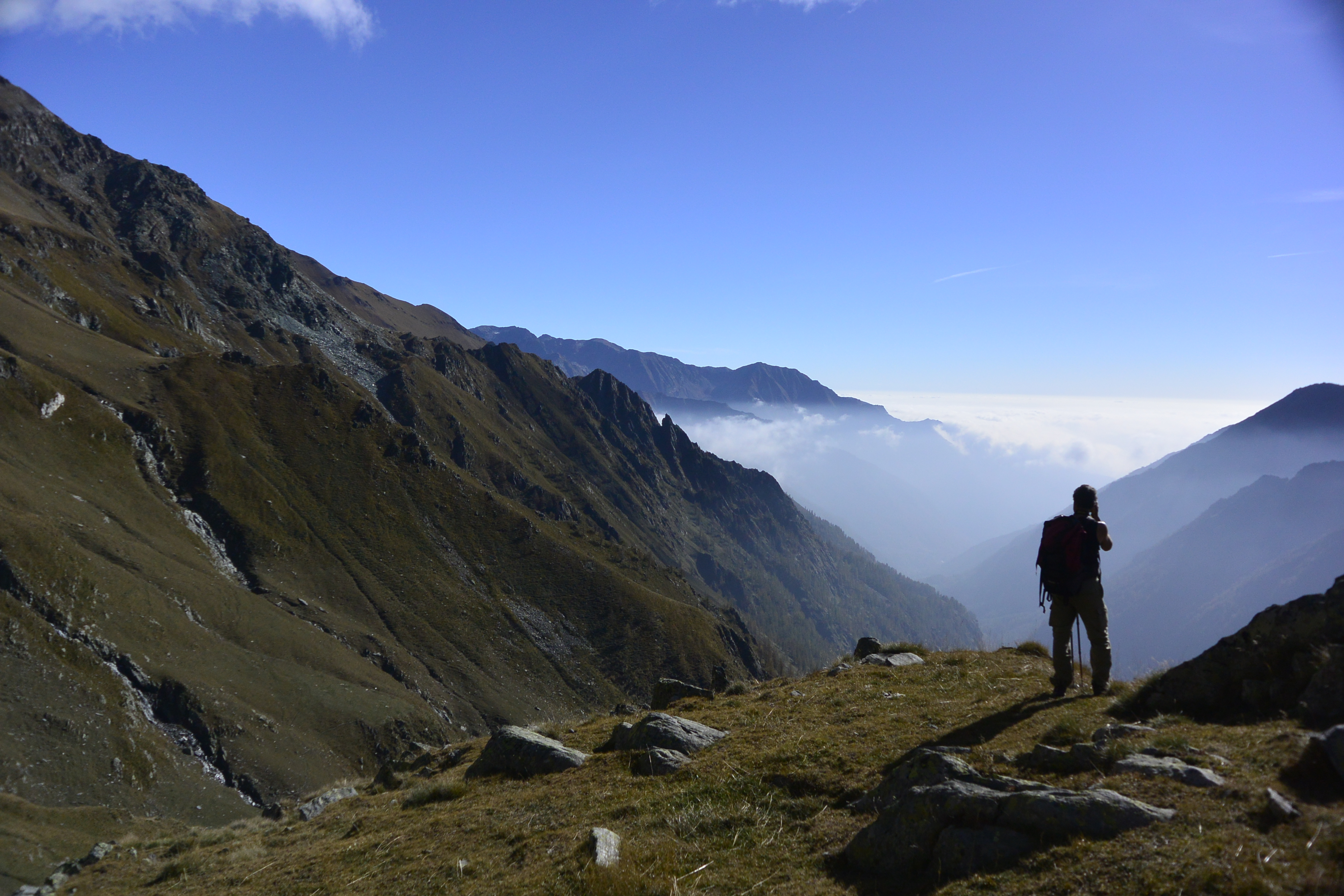 Fotografia realizzata nel contesto del progetto LIFE PastorAlp